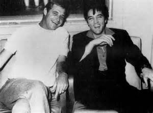 Felton Jarvis, Record Producer of Elvis Presley